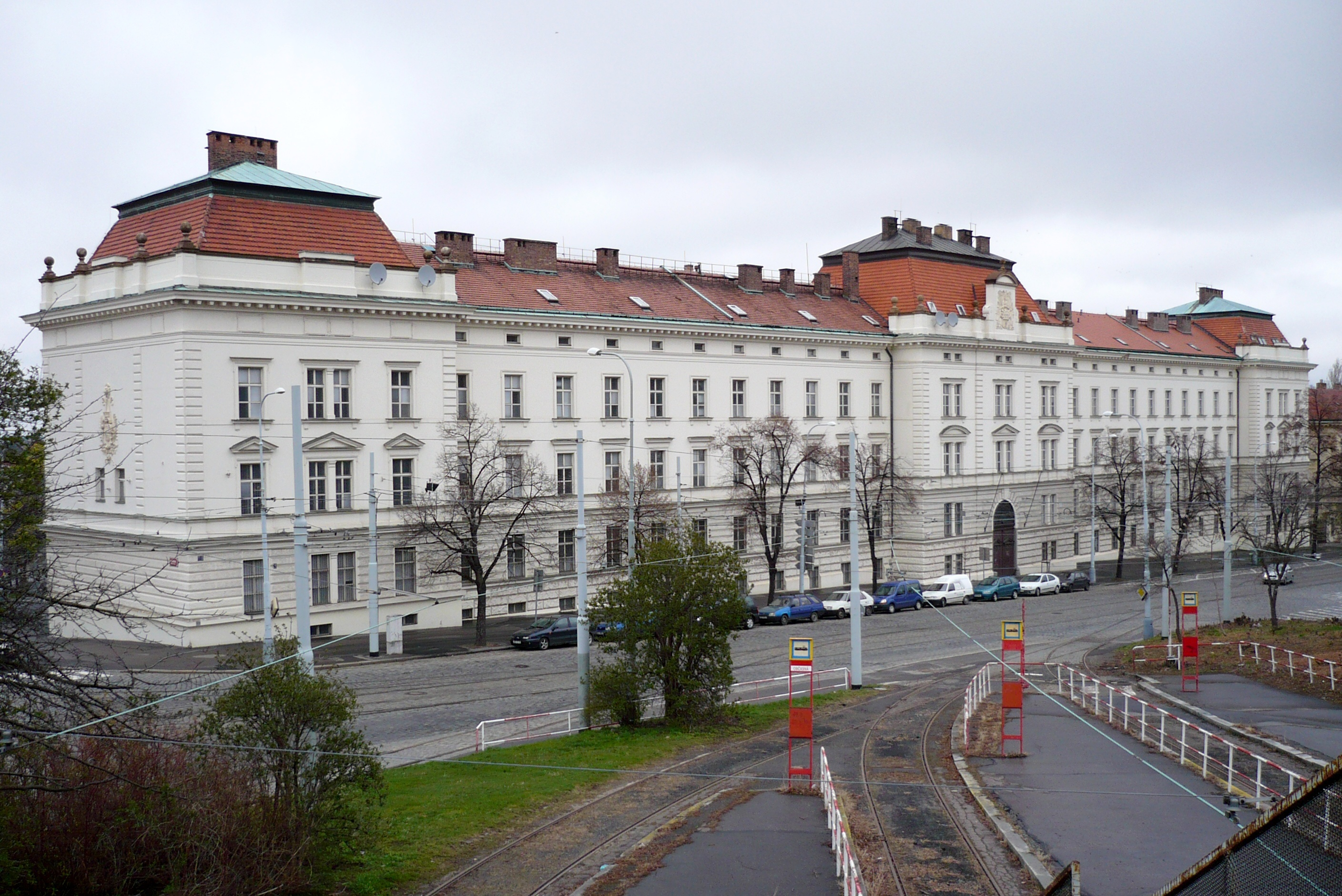 Praha, Hradčany - jedna z budov kasáren na Pohořelci (roh ulic Myslbekova a Dlabačov)